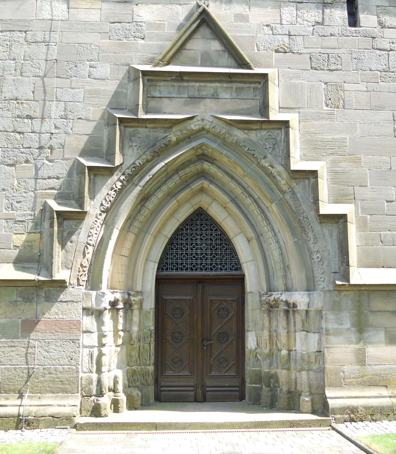 Brilon Propsteikirche Portal Turm